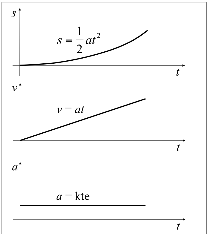 Higidura zuzen uniformeki azeleratuaren desplazamendu, abiadura eta azelerazioaren eboluzio denboralen adierazpen grafikoa.